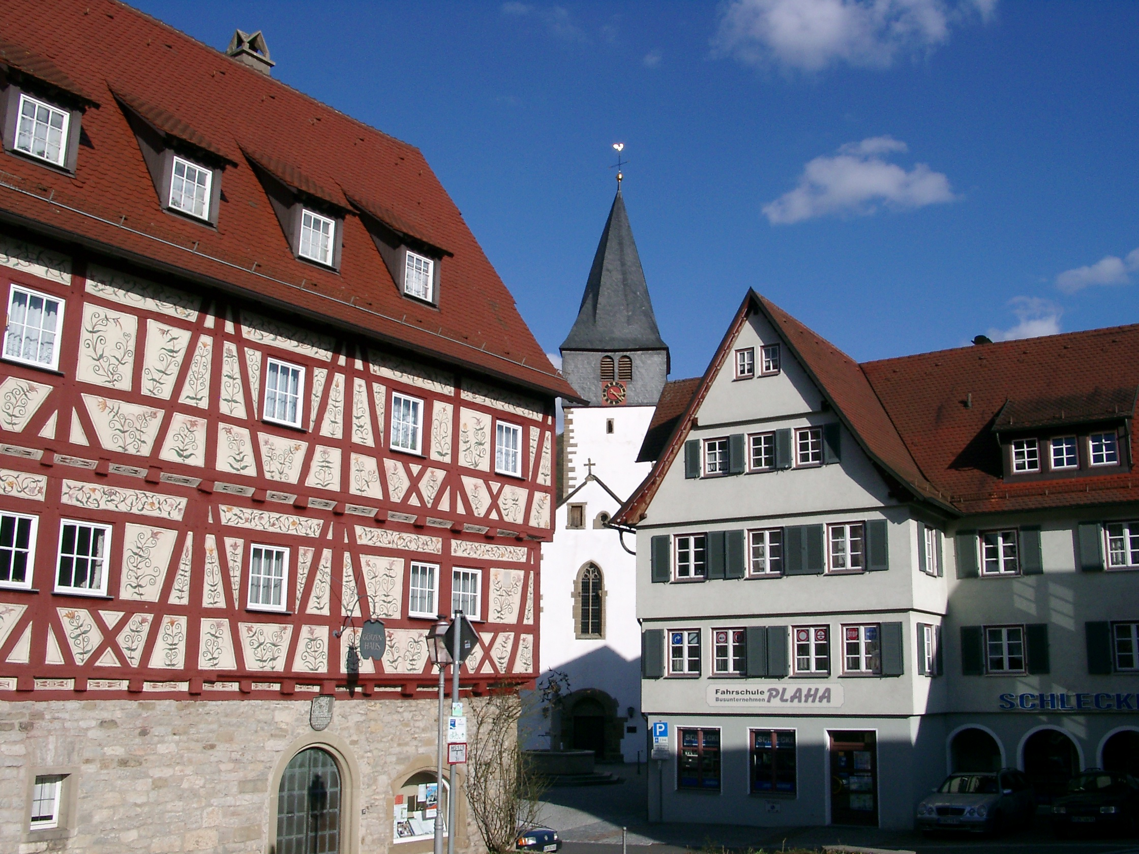 Niedernhall, Goetzenhaus. Im Hintergrund die Laurentiuskirche